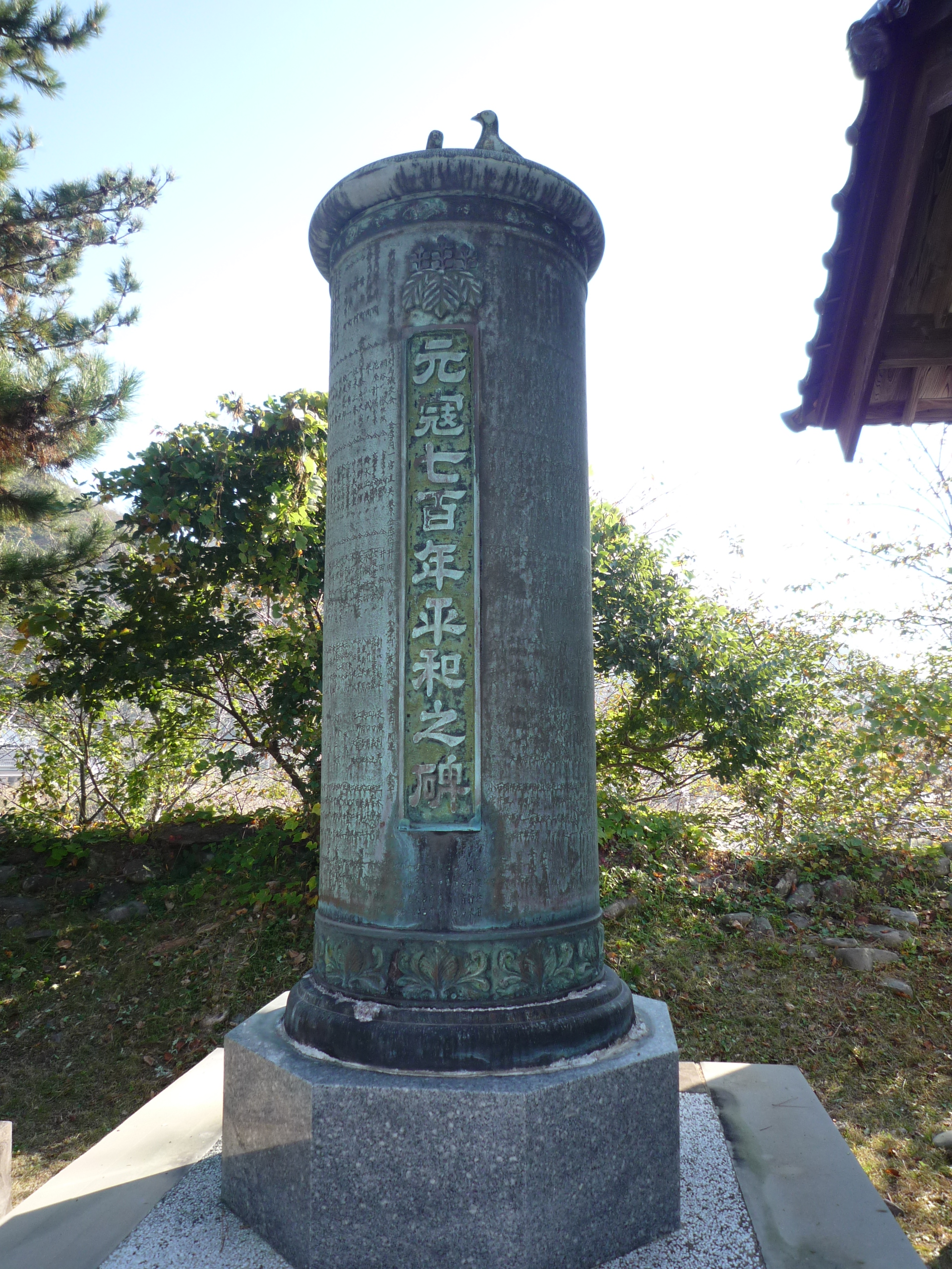 長崎県対馬市厳原の小茂田神社にあります